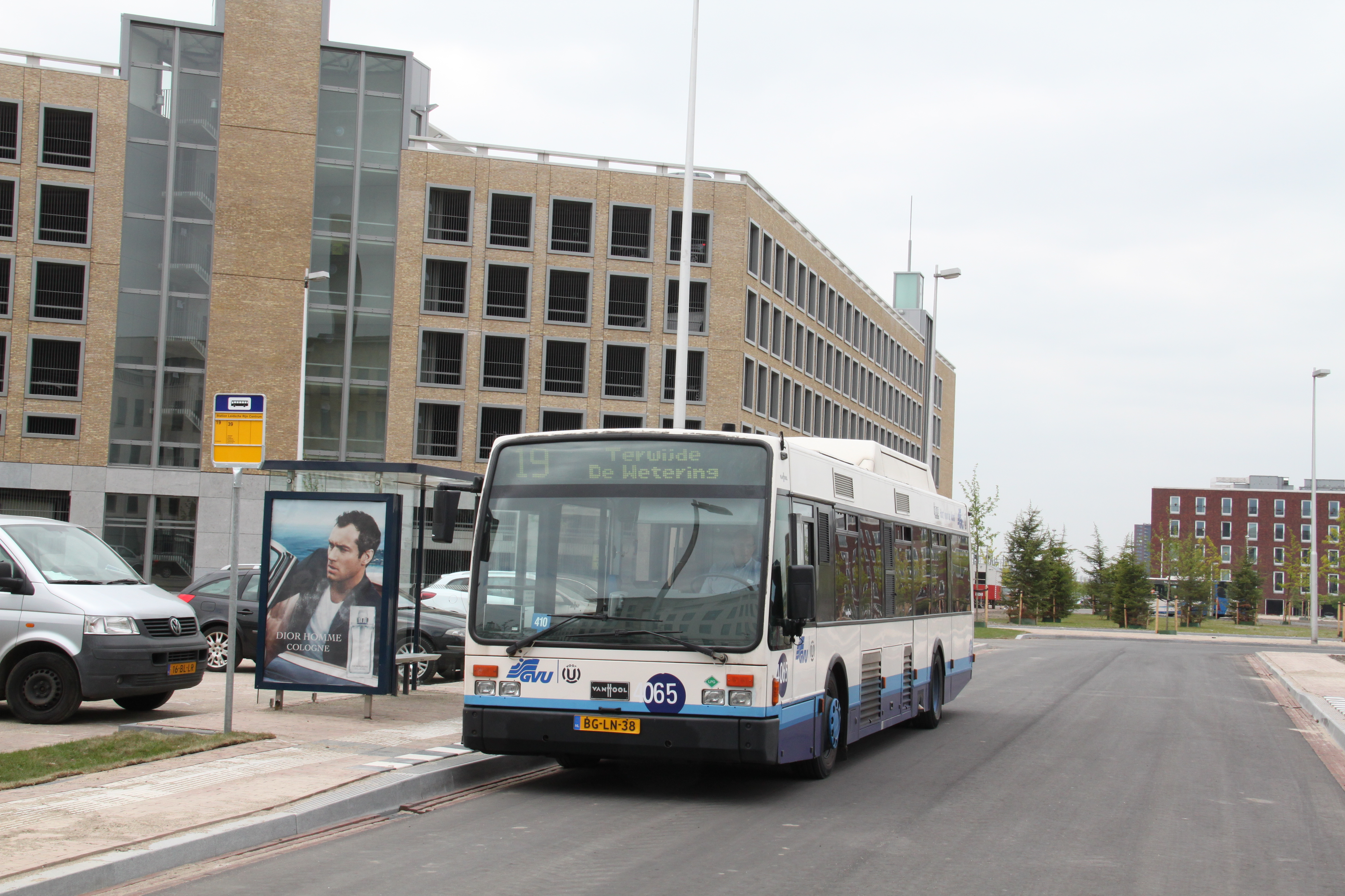 Station Utrecht Leidsche Rijn is op 9 juni 2013 geopend als nieuw station op de spoorlijn Utrecht - Woerden